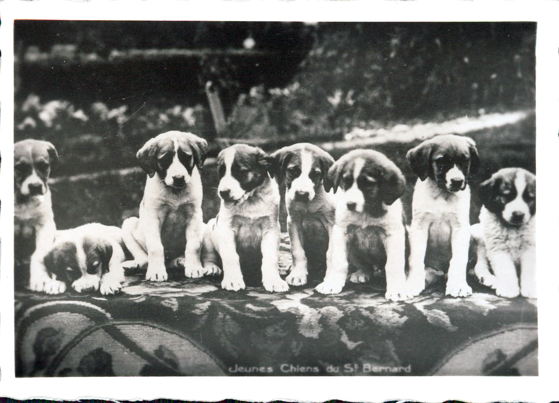 Aufnahme vom Hospiz auf dem Grossen Sankt Bernhard